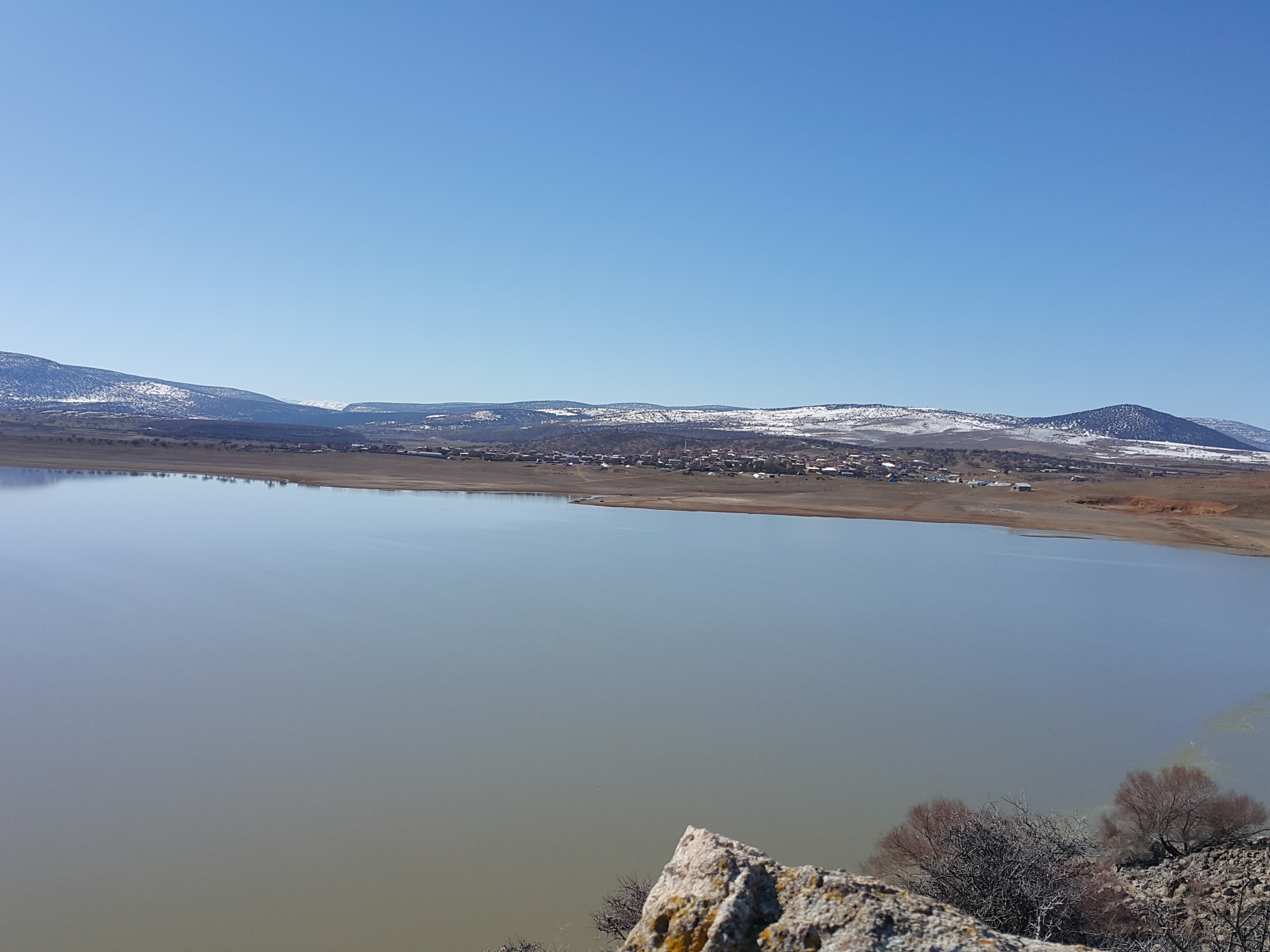 Apasaraycık mahallesinin genel görünüşü